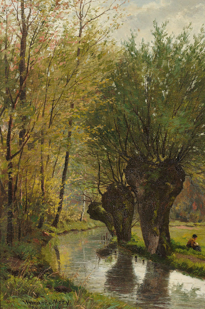 Karl Christian Wymann-Mory (1836–1898): Bachlauf mit Knüppelweiden und Figurenstaffage an einem Frühlingstag. Öl/Lwd. auf Holz. 48 x 32 cm.